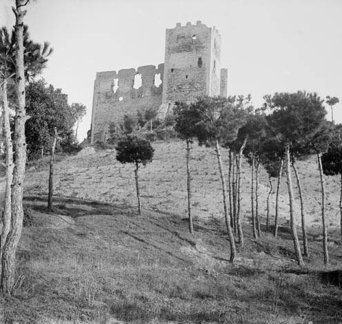 Imatge